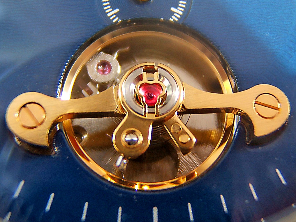 Anker mit Unruhe eines Chronographen, der deutlich die als Lager verwendeten Rubine erkennen lässt.